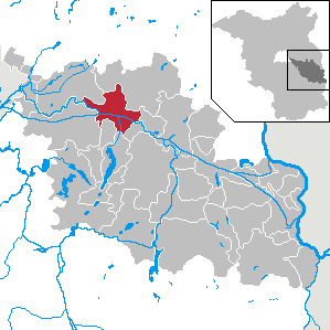 Fürstenwalde/Spree in Brandenburg (Country) - District Oder-Spree